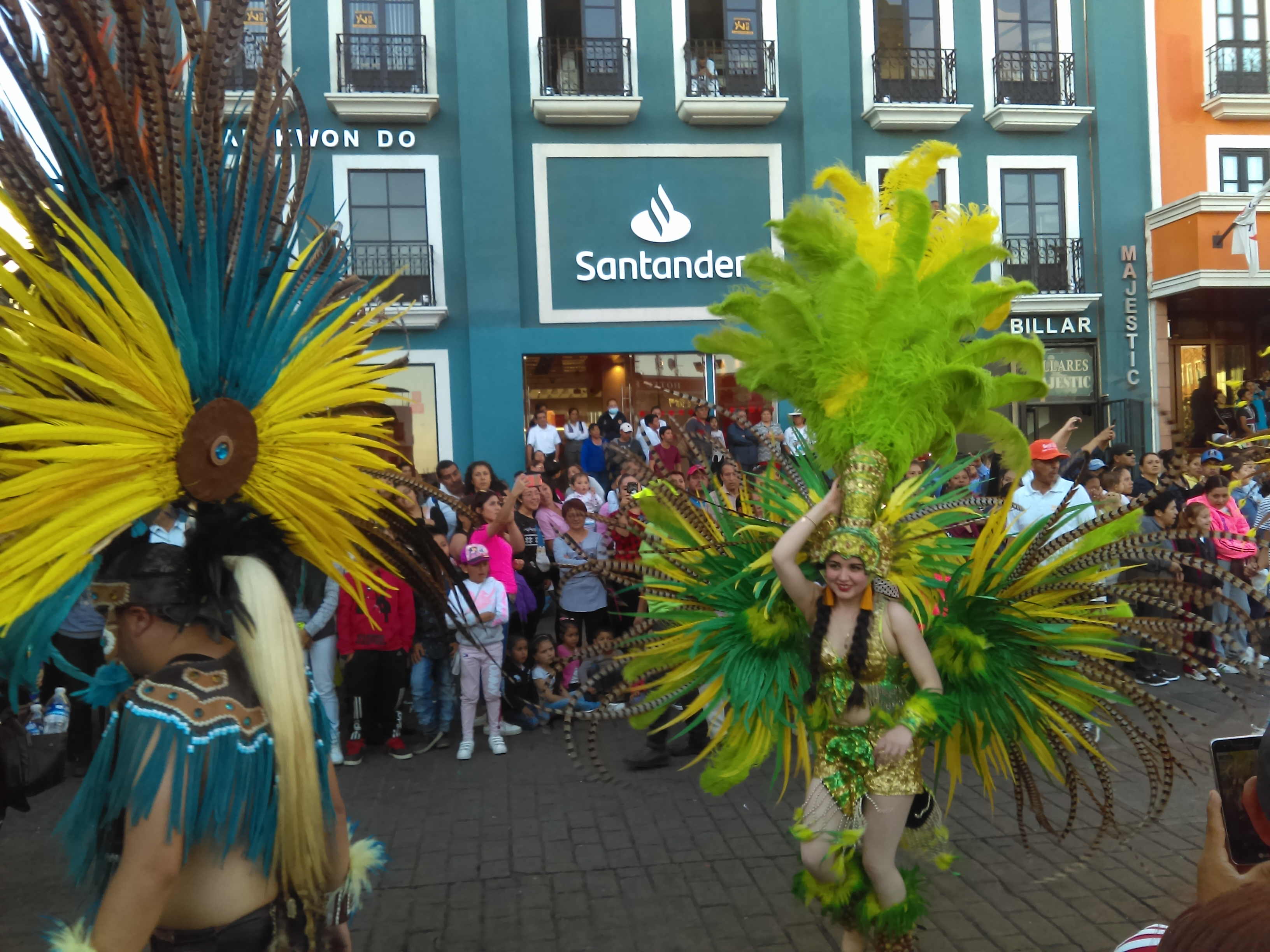 Previo a los festejos del carnaval, desde 2013 en el mes de febrero, se realiza el desfile “Magia de los Carnavales de Hidalgo en Pachuca”. Donde distintos municipios de Hidalgo hacen demostración de sus respectivos carnavales con música y danzas regionales, vestuarios típicos, comparsas y chicoteros. El desfile empieza en avenida Revolución a la altura del Jardín del Arte, sigue por la calle Allende, da vuelta en la Plaza Independencia, luego por las calles Doria y Guerrero, y finaliza en la Plaza Juárez. Entre los municipios que participan se encuentran Acaxochitlán, Alfajayucan, Atotonilco el Grande, Atlapexco, Apan, Calnali, Chapulhuacan, Eloxochitlán, Huautla, Huehuetla, Huejutla de Reyes, Jacala de Ledezma, Jaltocán, Metepec, Metztitlán, Mixquiahuala de Juárez, Molango de Escamilla, San Agustín Metzquititlán, San Bartolo Tutotepec, San Felipe Orizatlán, Santiago de Anaya, Tecozautla, Tepeapulco, Tenango de Doria, Tulancingo de Bravo, Tlahuelilpan, y Zacualtipán de Ángeles.